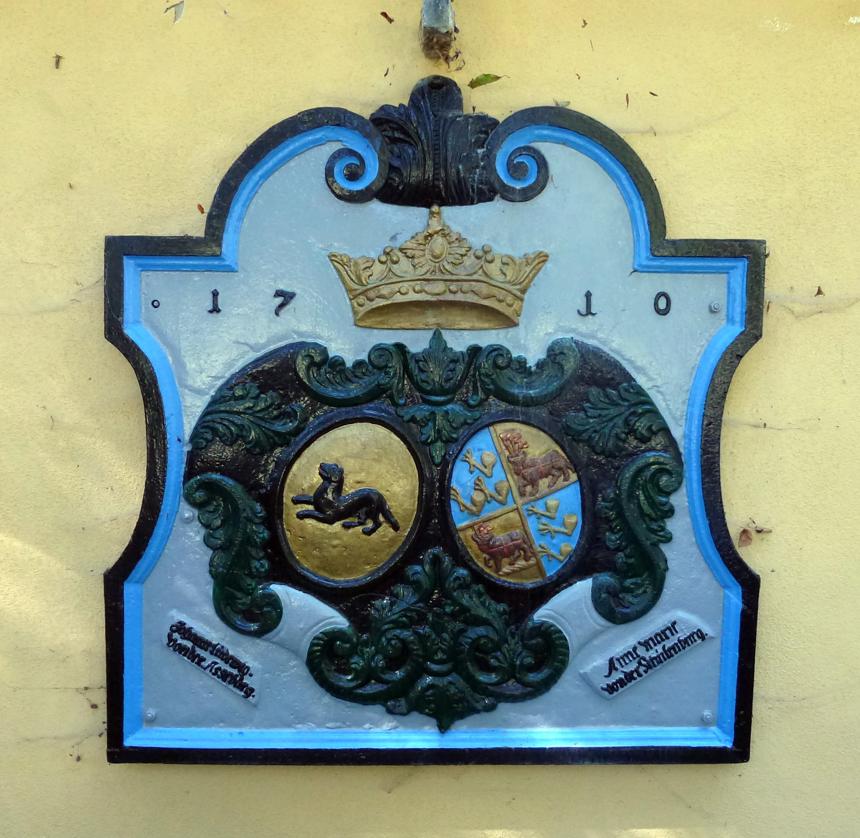 Gedenktafel am Haus Eremitage. Darauf die Jahreszahl 1710 und die Wappen der Asseburger und der Schulenburger. Unten stehen die Namen Johann Ludwig von der Asseburg und Anne Marie von der Schulenburg.